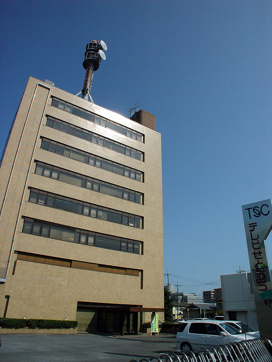 テレビせとうち本社・旧社屋 （岡山市野田五丁目 岡山県道21号(児島線)沿いにて）